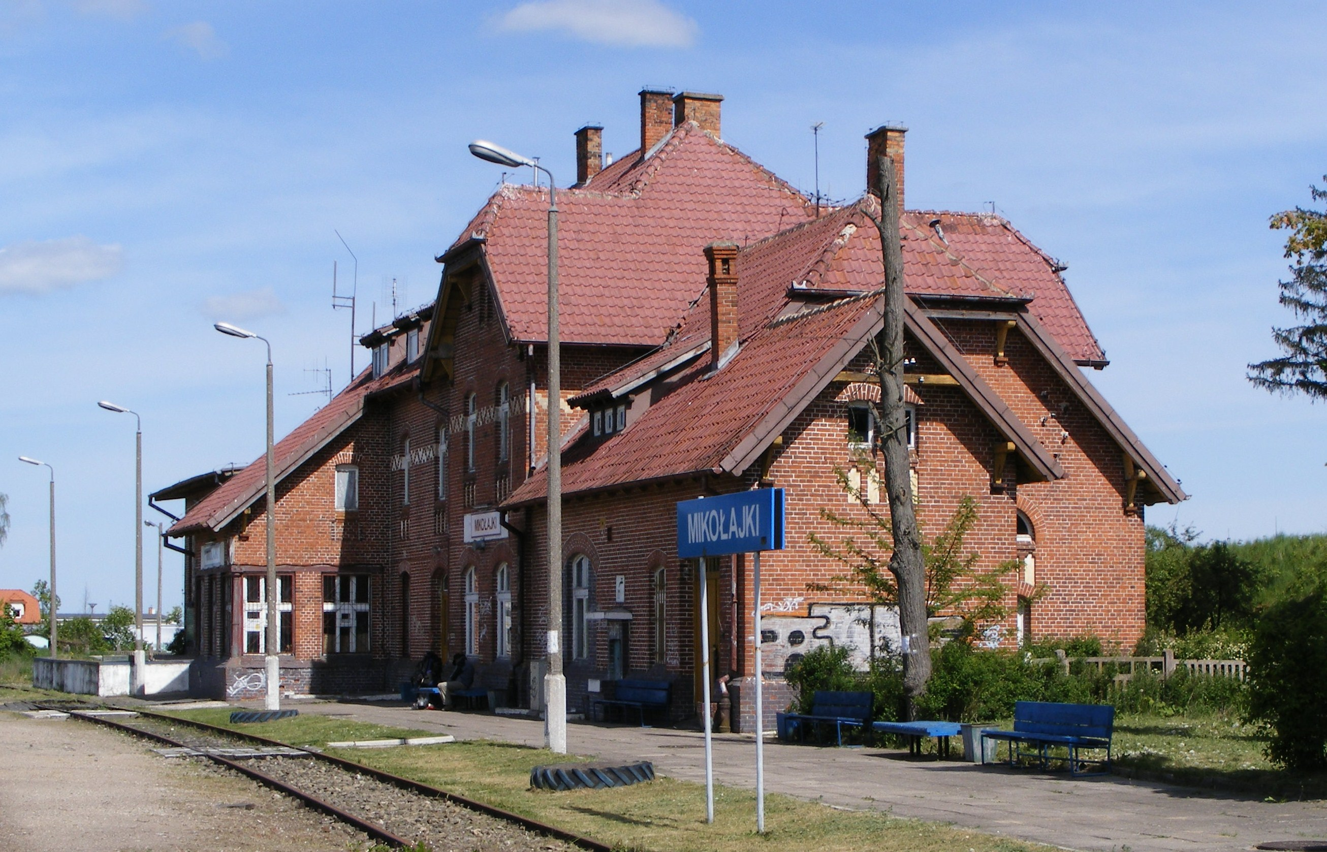 Zabudowania Dworca PKP.